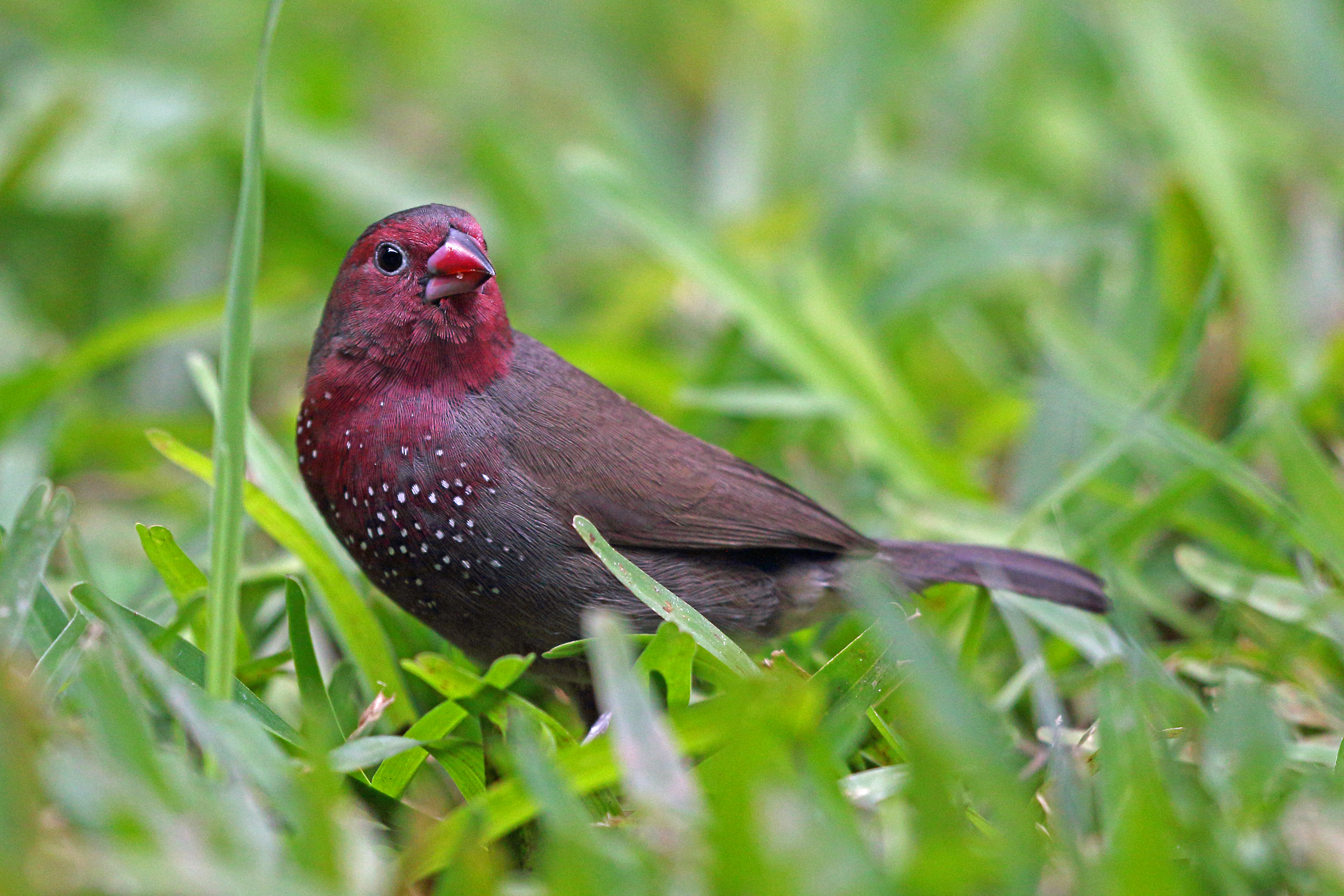 Male